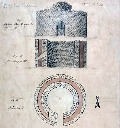 Der alte Vigilienturm (Ruine) 1837, vor dem Abriß. Tuschezeichnung im Heimatmuseum Bad Dürkheim.